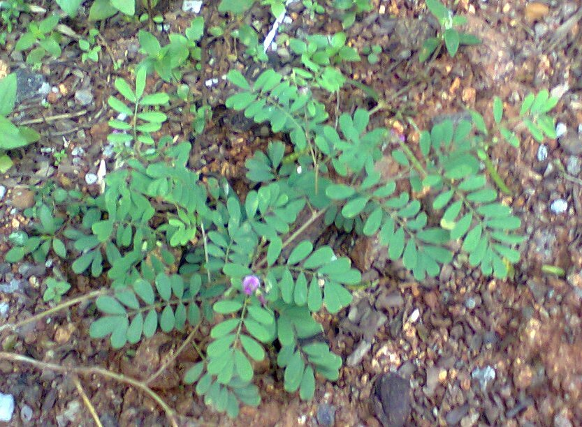 own shot - கொழுஞ்சி, கொழஞ்சி, வன்னிலத்தில் தானே வளரும் செடி. நன்செய் நிலத்தில் இதனை மிதித்துப் பயிரிட்ட இடத்தில் நெற்பயிர் செழித்து வளரும்.